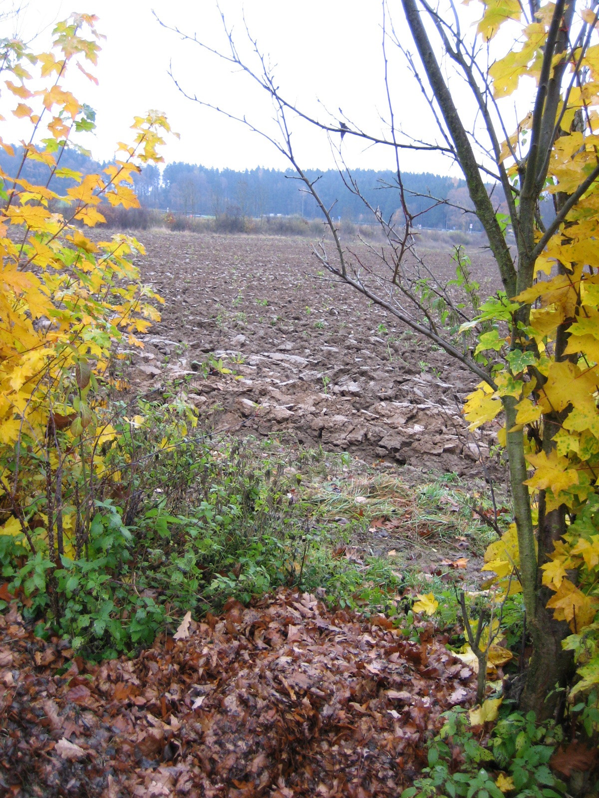 Ein Acker mit Ackerschollen bei Adelsried im Landkreis Augsburg, Deutschland